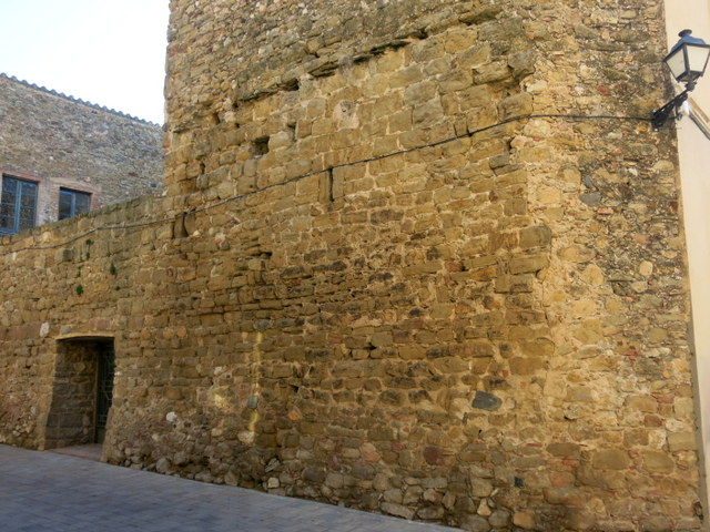 paret de l'antic castell de Verges al Baix Empordà